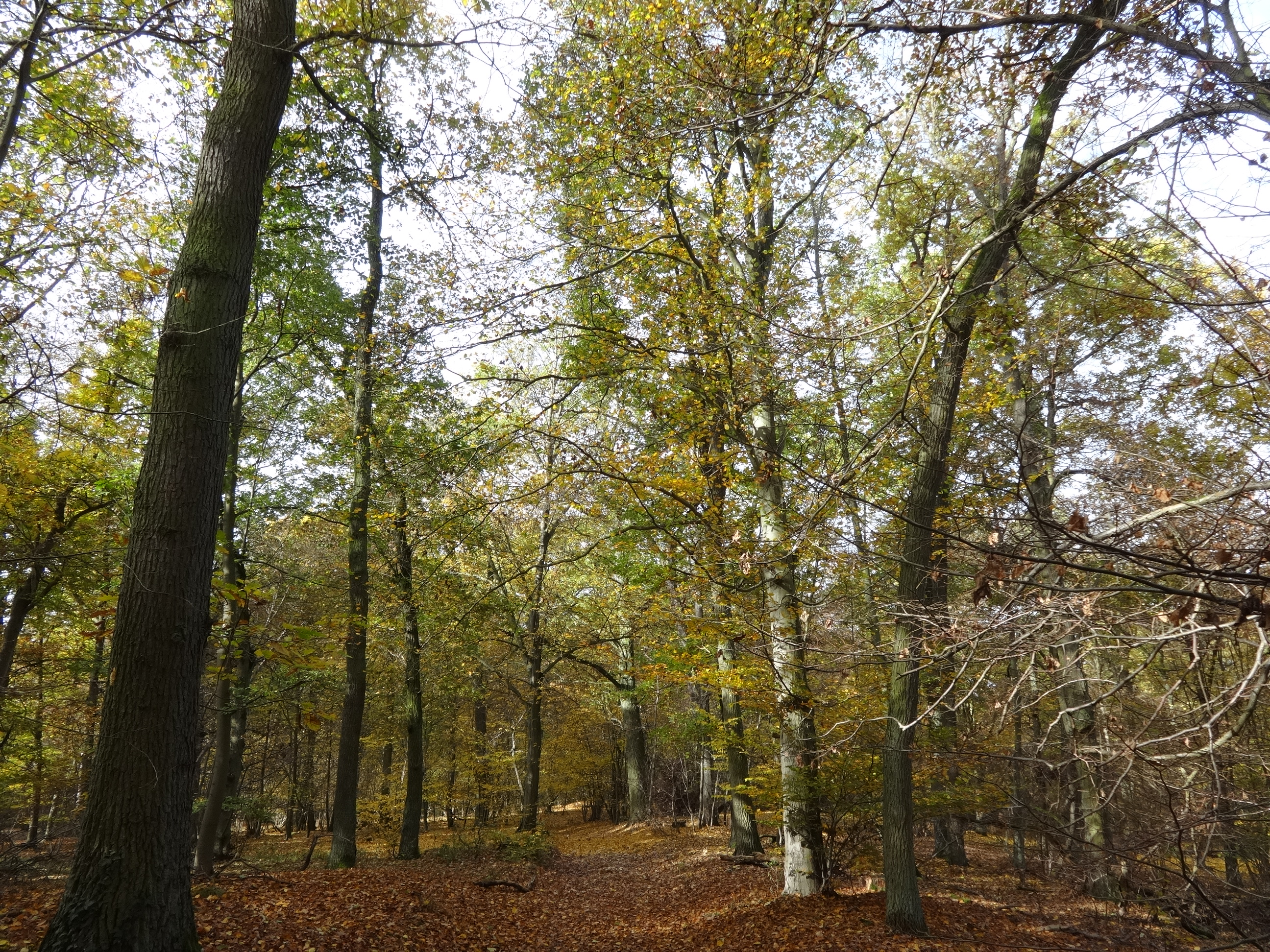 Das Lindholz ist ein 112 ha großes Naturschutzgebiet in Paulinenaue im Landkreis Havelland.